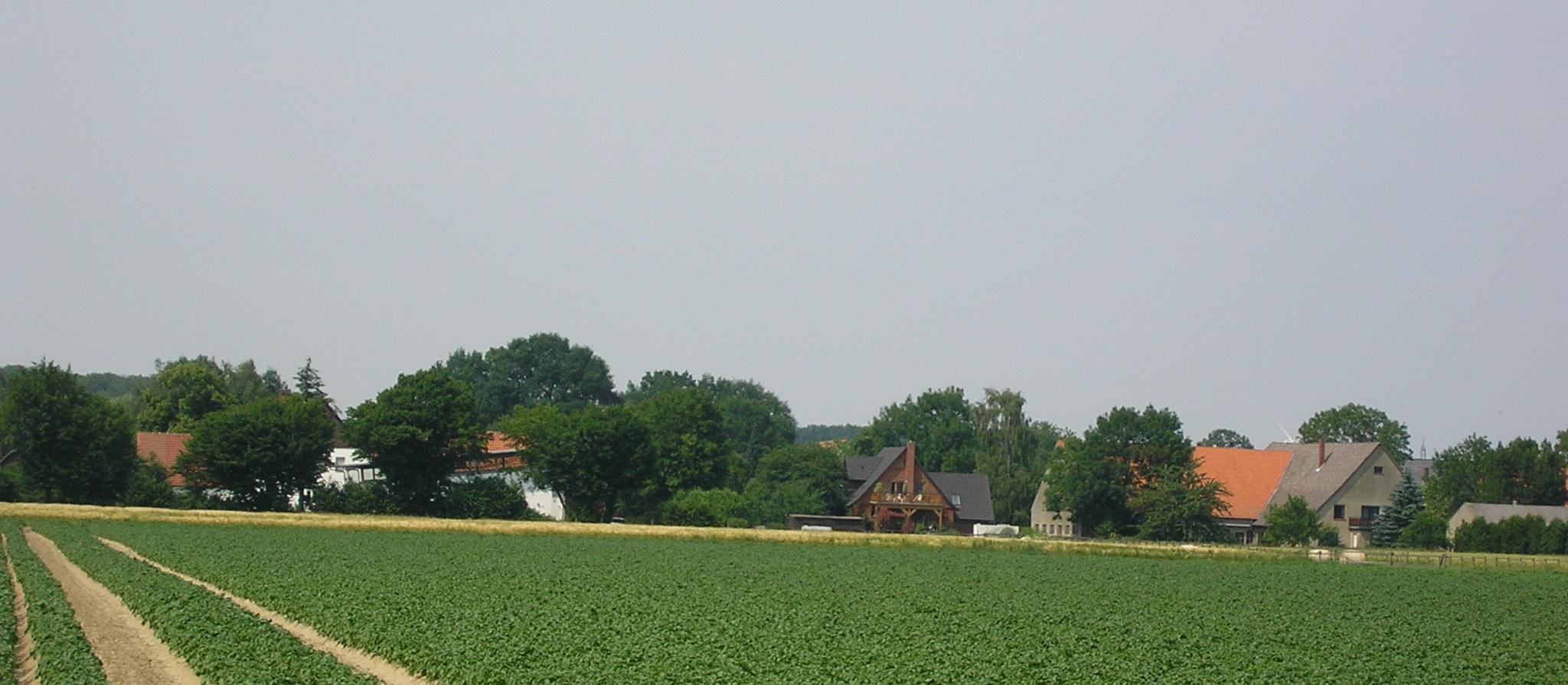 Ort Stockhausen bei Lübbecke vor dem Wiehengebirge von Süden gesehen